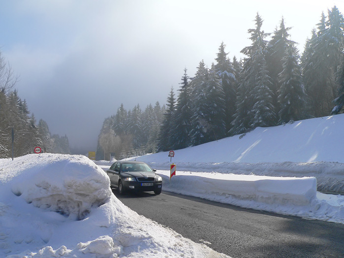 Harzhochstraße B 4 / B 242 Höhe Königskrug